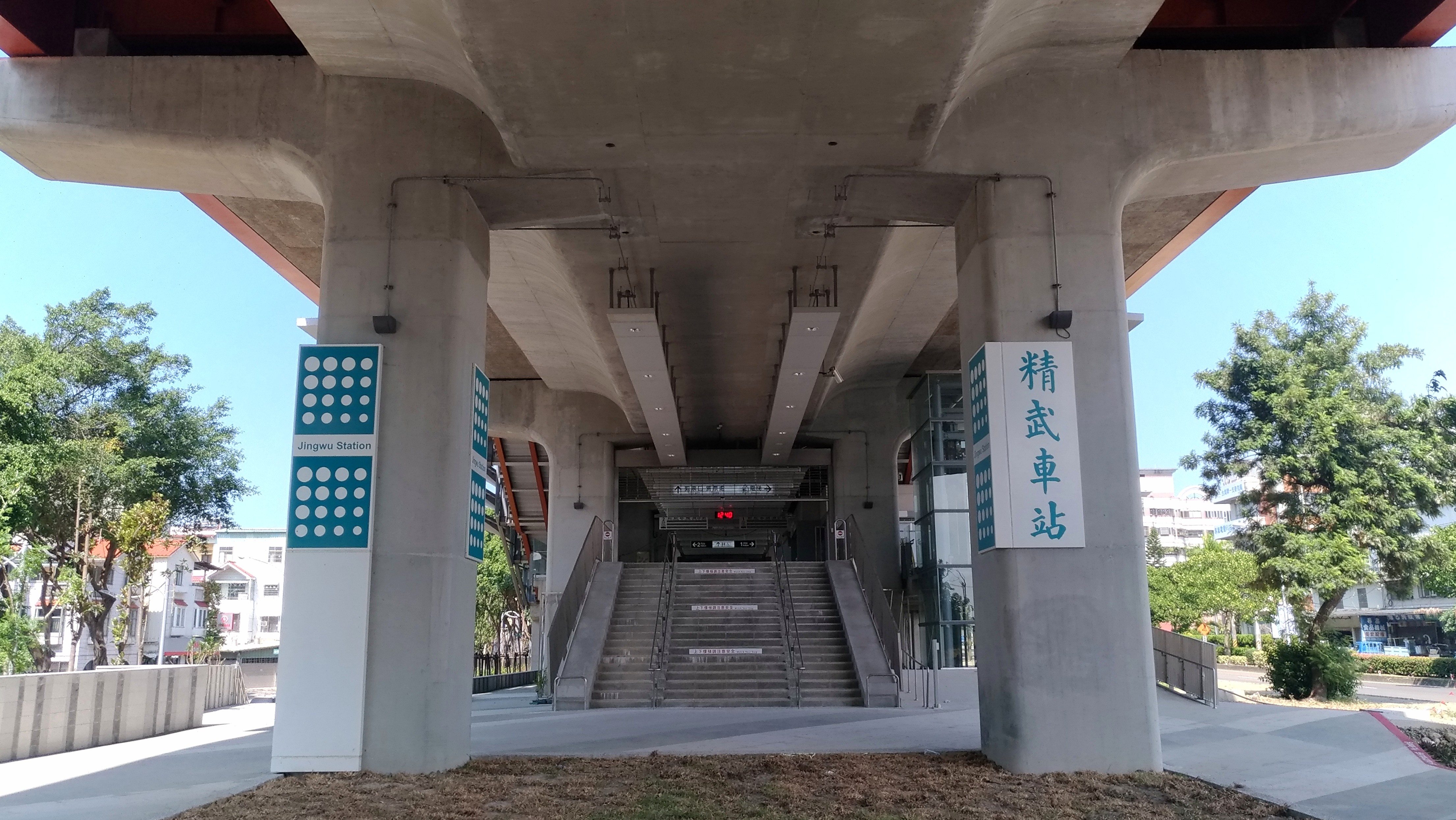 臺灣鐵路管理局精武車站。